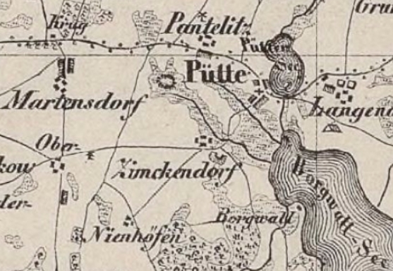 der Schloßberg bei Pantelitz auf der Karte von Neu-VorPommern und der Insel Rügen / entworfen von Dr Fr. V. Hagenow 1839